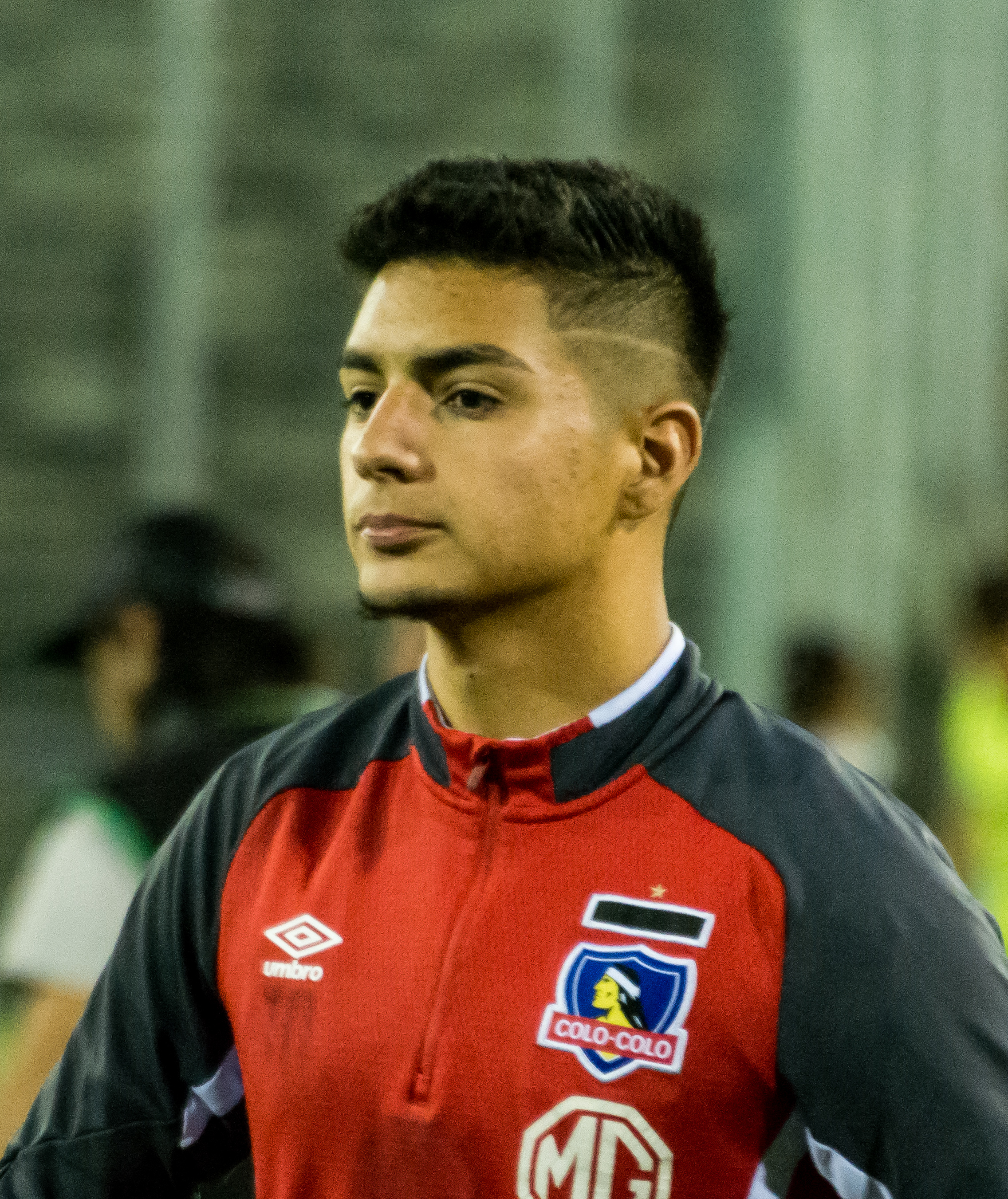 Colo-Colo v Palestino, Estadio Monumental, Macul, Santiago, Región Metropolitana, Chile